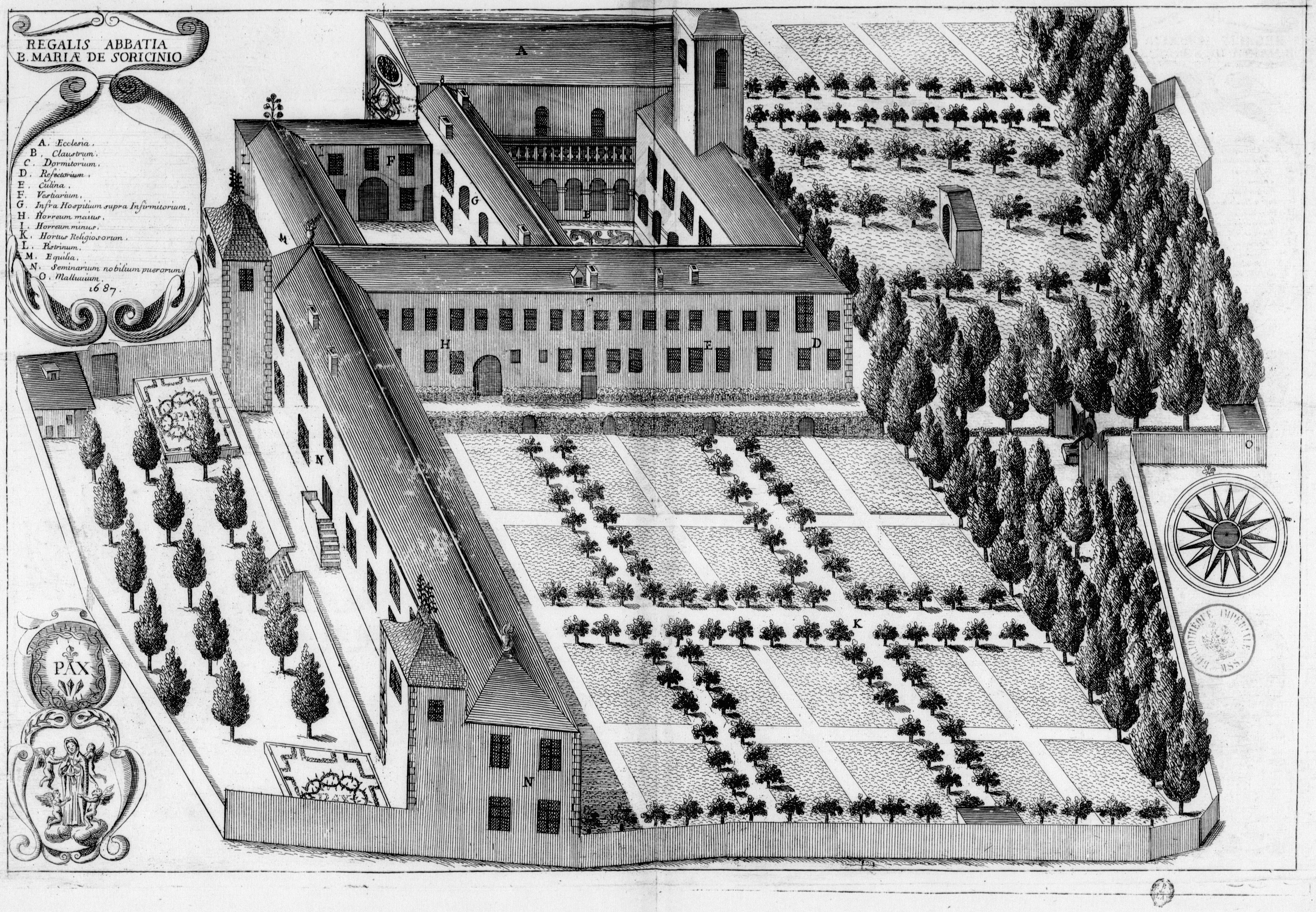 Planche gravée du 17ème siècle représentant l'abbaye Notre-Dame de Sorèze, en France, dans le livre Monasticon Gallicanum.